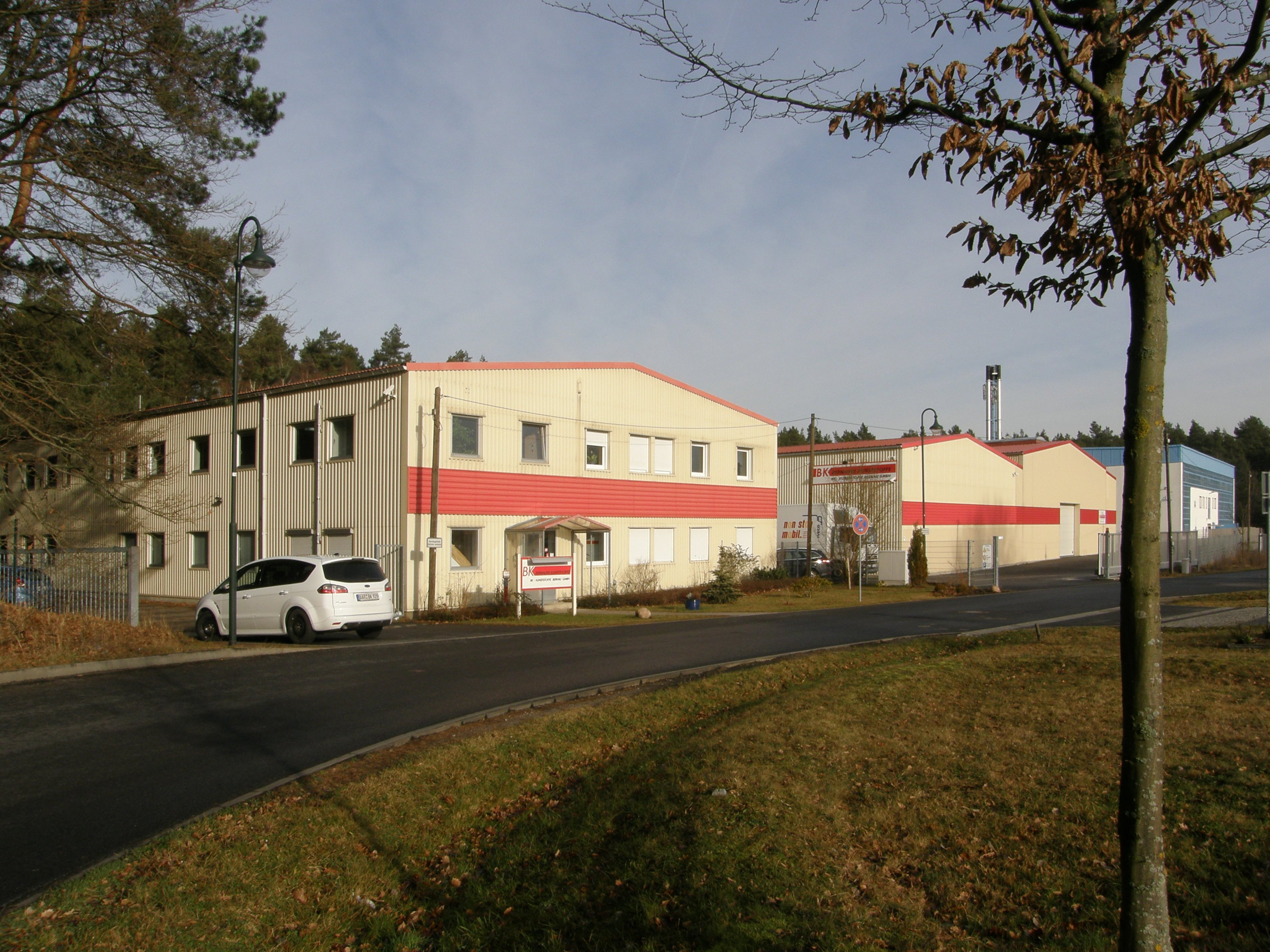 Bernau bei Berlin, Stadtteil Waldfrieden: Werk Kunststoffe Bernau